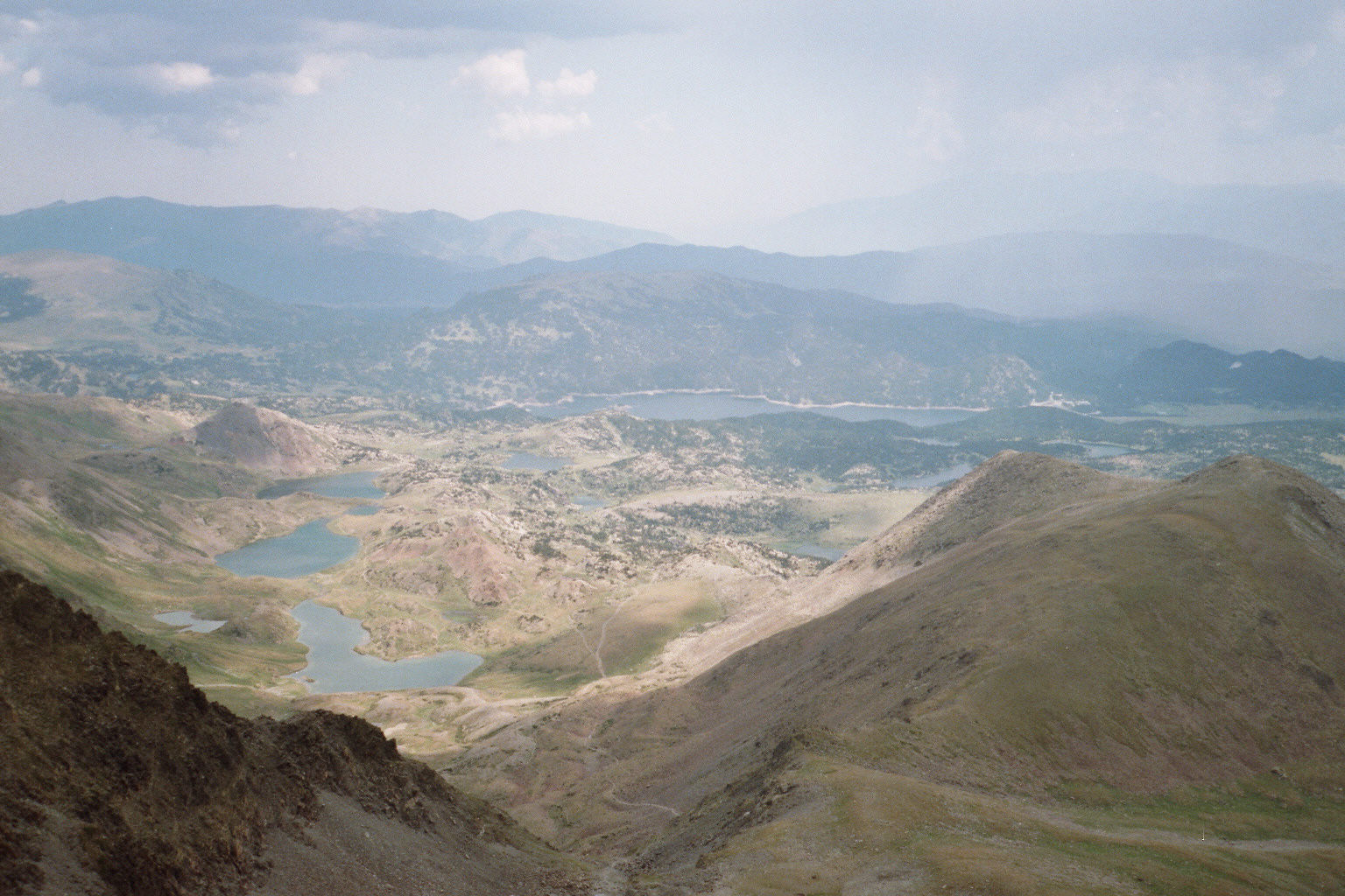 Little lakes above Bouillouses main lake, seen from the Mount Carlit, in the Pyrénées (France)